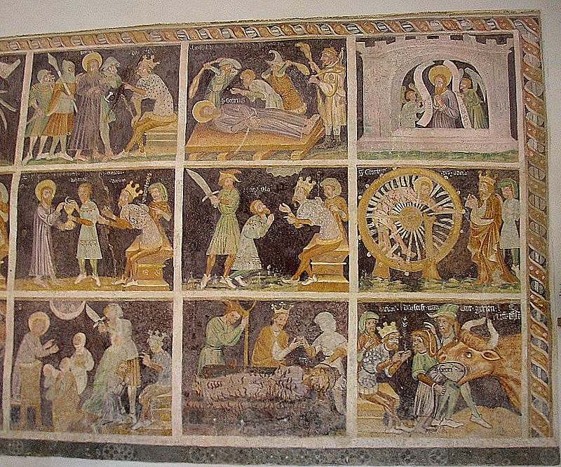 Kapelle St. Georg bei Peißenberg (Landkreis Weilheim-Schongau, Oberbayern). Gotische Wandmalerei "Leben des hl. Georg" (um 1400/10), Ostteil. Eigene Aufnahme, August 2007 / St. George's chapel near Peissenberg (Upper Bavaria, Germany). Gothic wallpainting " Life of St. George" (ca. 1400/10), eastern part. Own photo, Aug. 2007